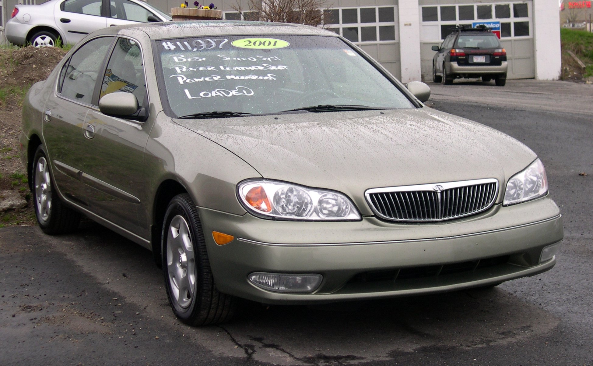 2001 Infiniti I35